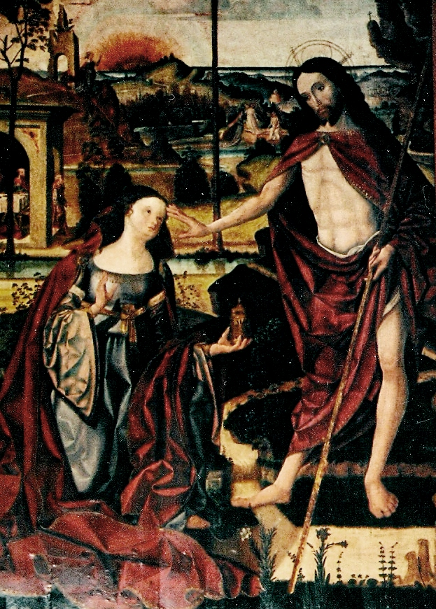 Tabla "Noli me tangere" (siglo XVI) del Maestro de Chinchilla, en la iglesia de Chinchilla